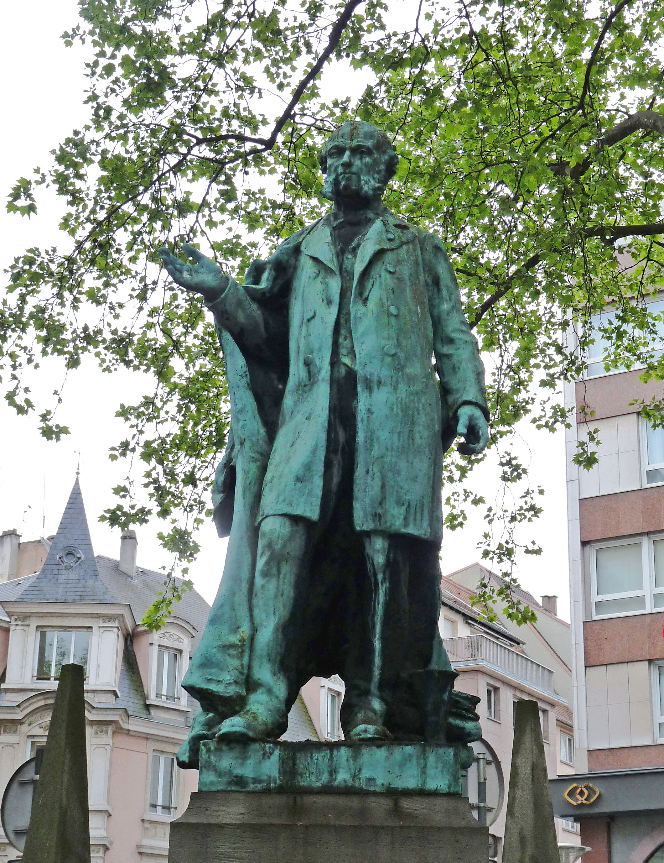 Statue en bronze de Charles Adolphe Würz, place Saint-Pierre-le-Jeune, à Strasbourg (fonderie Alexis Rudier)